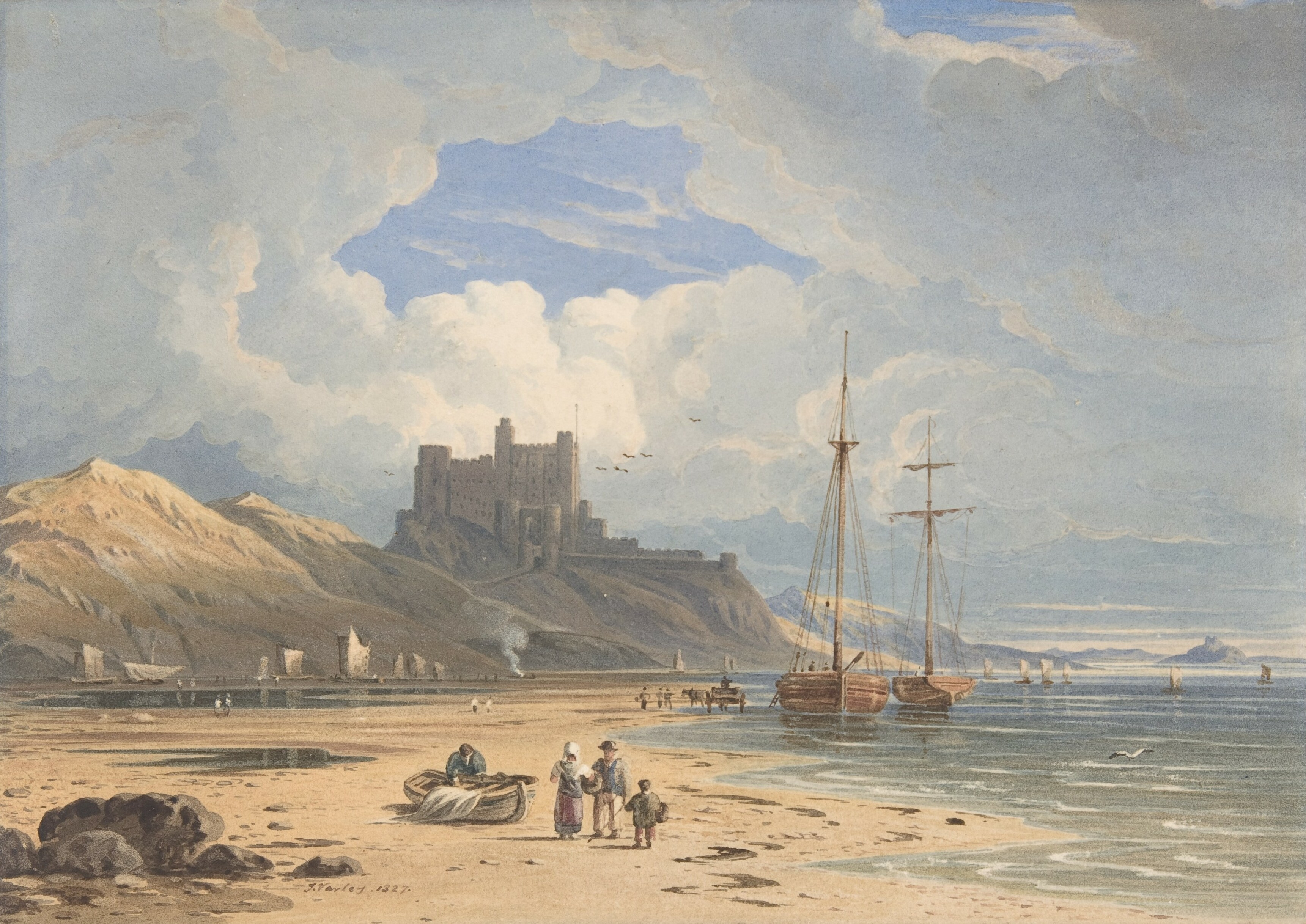 Drawing; Drawings